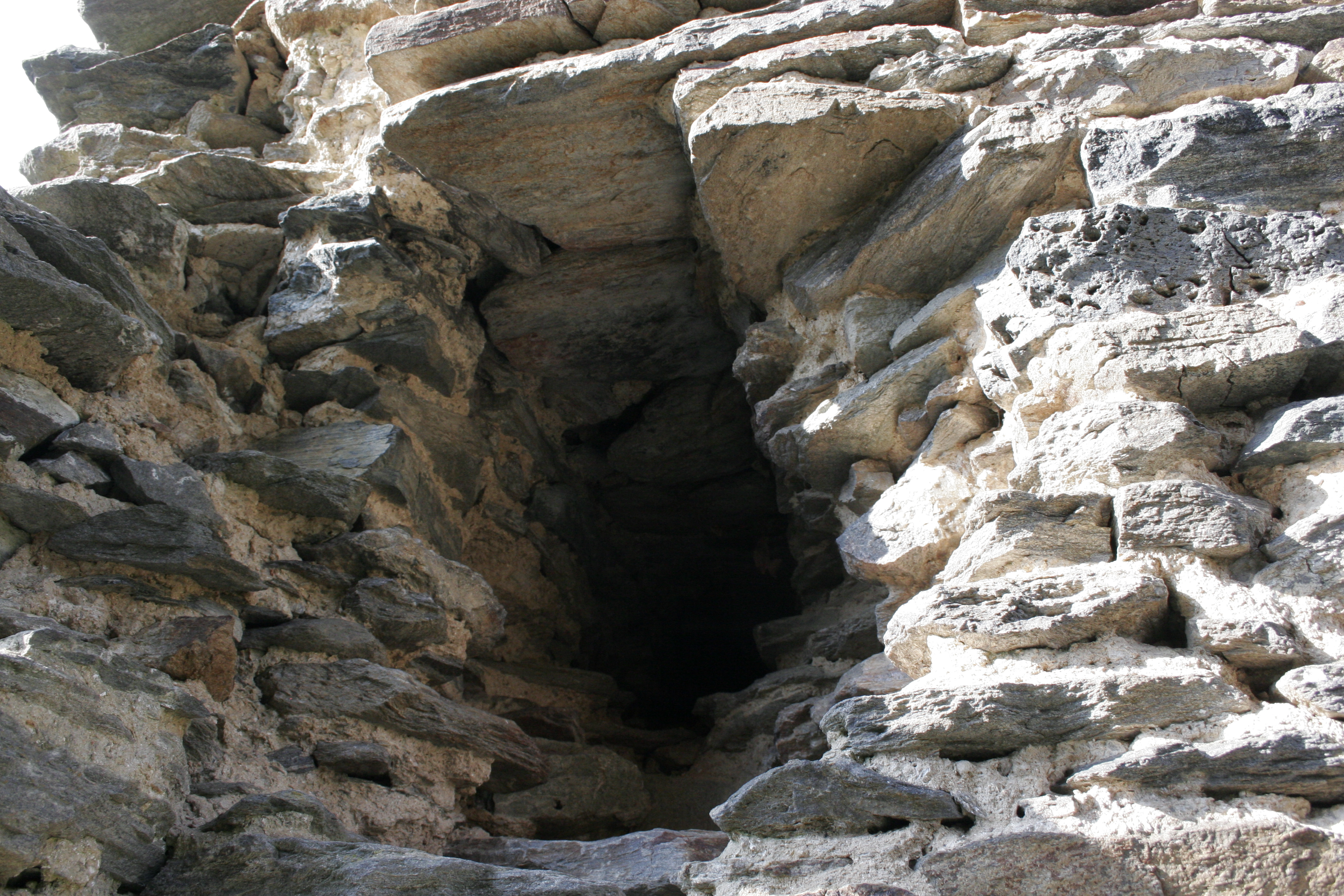 Hrad Pajrek, okres Klatovy, Česká republika.